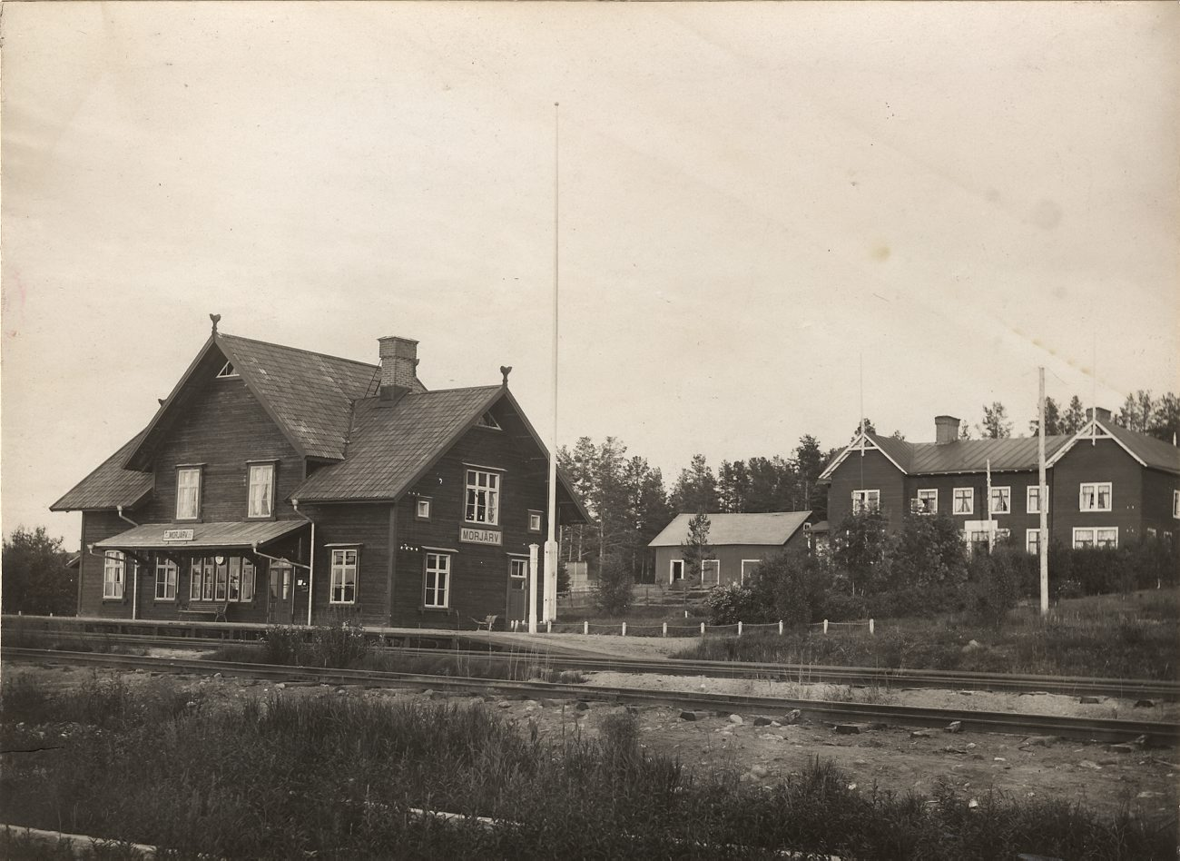 B8062. Morjärvs järnvägsstation och gästgivaregård. Fotografiet är skänkt till Tekniska museet från Svenska Turistföreningen.